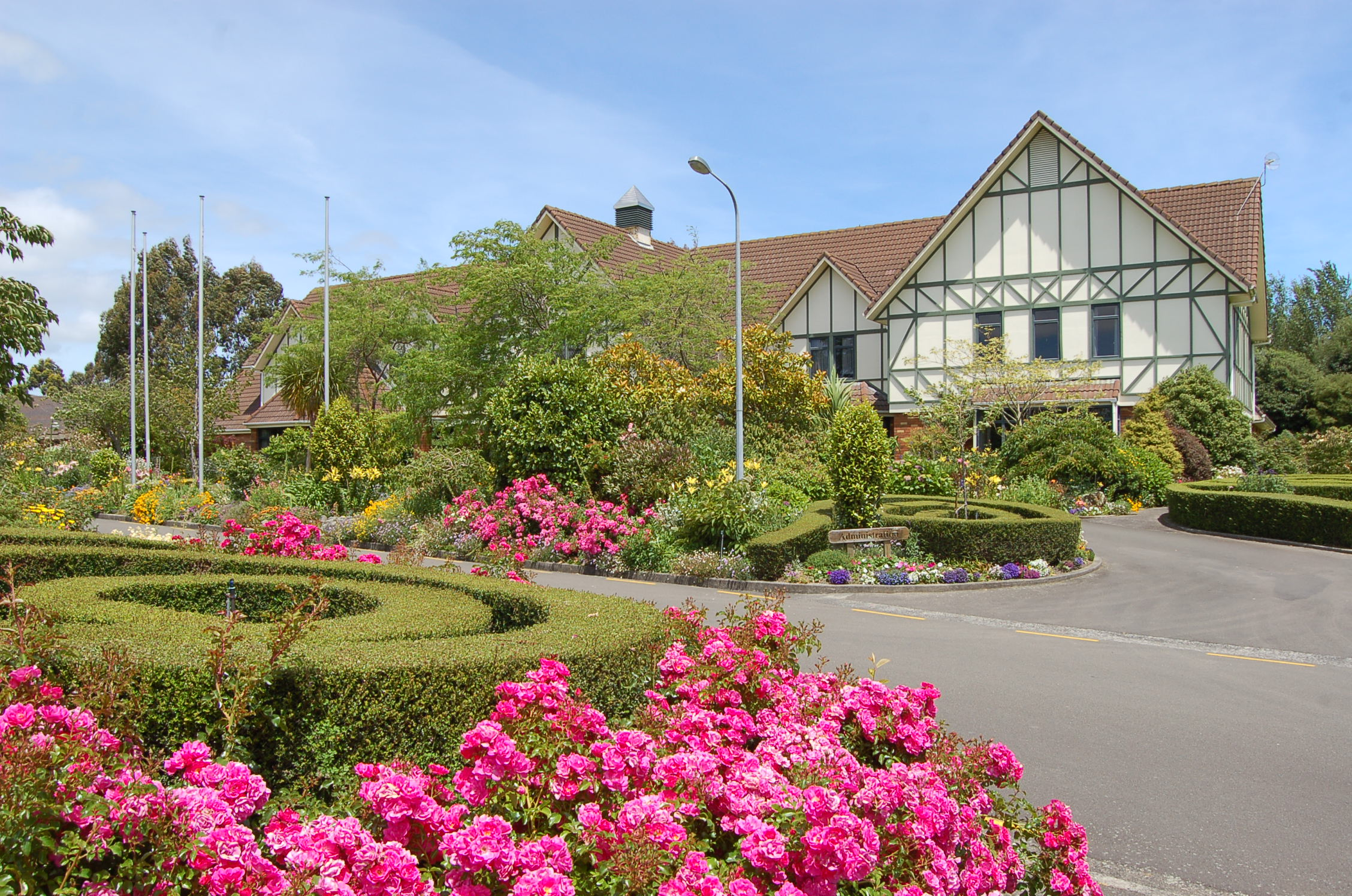 Здание Администрации (Admin Building, IPC Tertiary College, Palmerston north, NZ